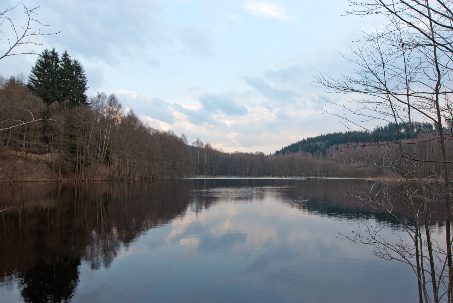 vodní nádrž u bývalé obce Krásní Lípa, Slavkovský les